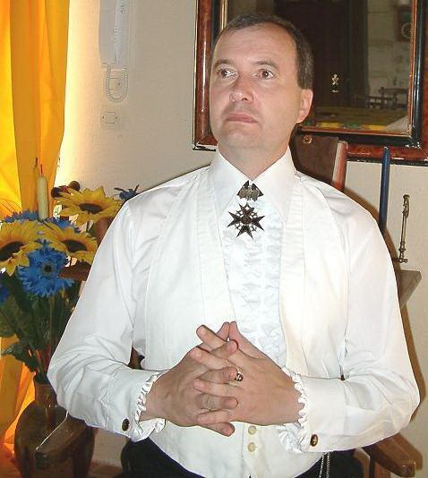 le comte Michel Faci